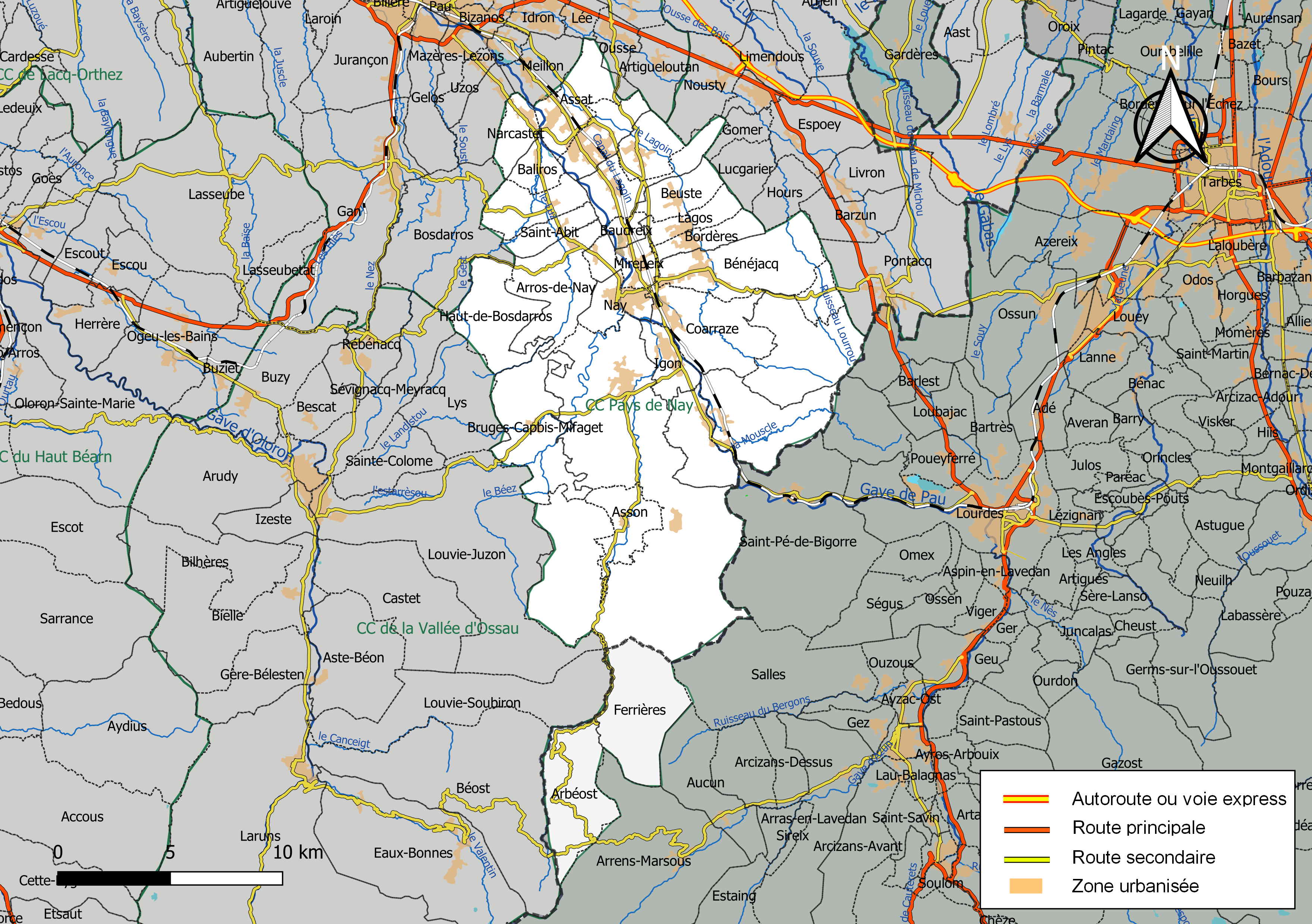 Carte géographique de la Communauté de communes Pays de Nay, département des Pyrénées-Atlantiques, France. Composition au 1er janvier 2019.